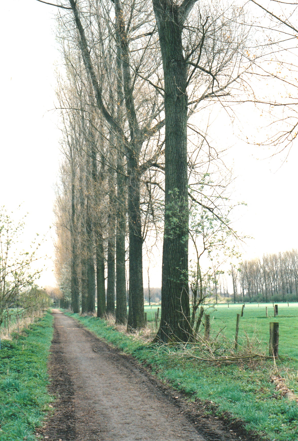 Pappelreihe im Pescher Hoppruch